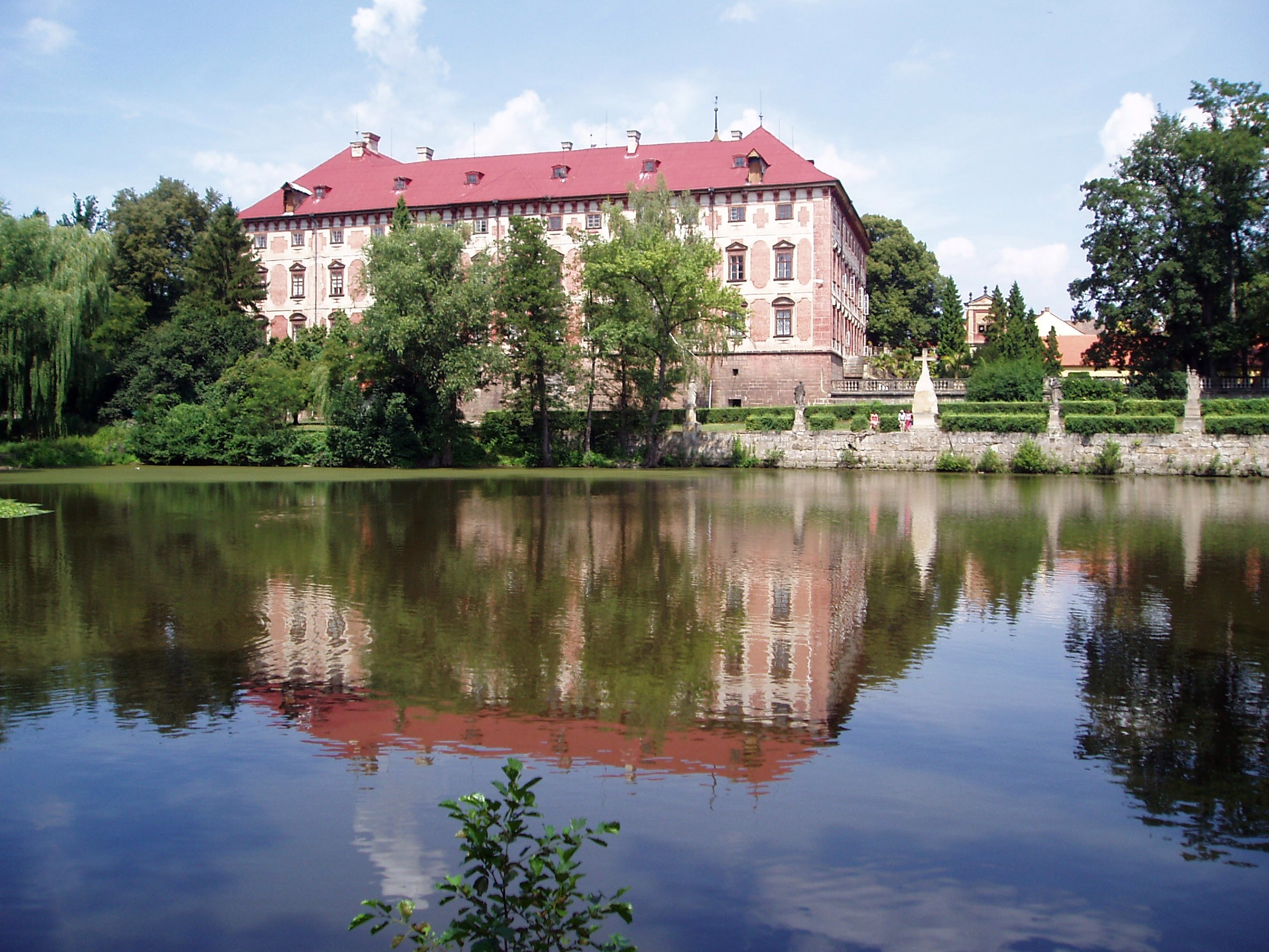 Státní zámek Libochovice